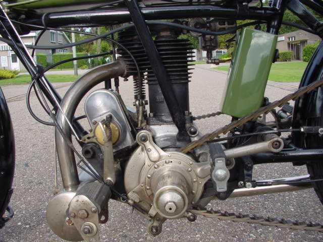 Rudge Multi voorpoelie.